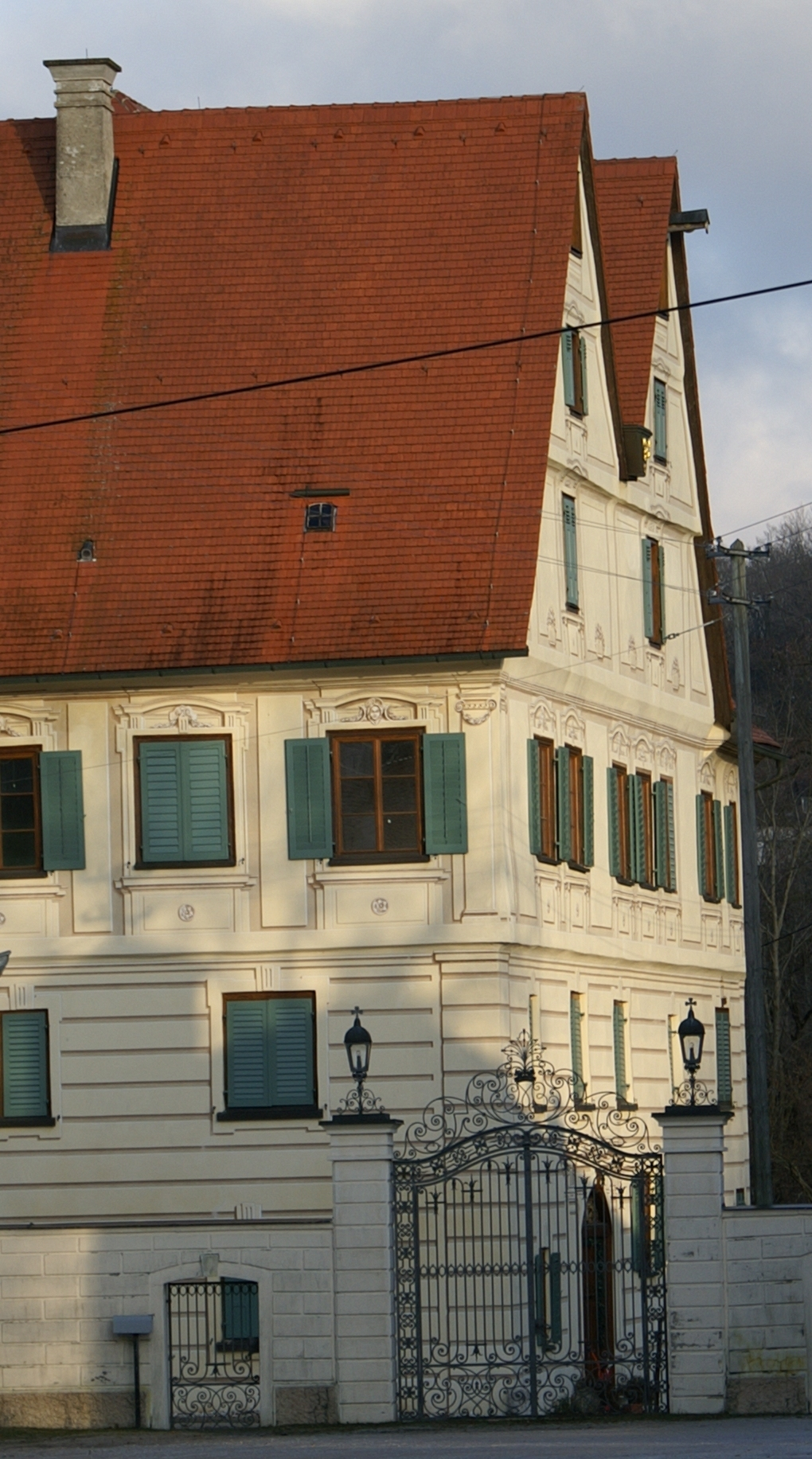 Schloss Oberherrlingen im Kleinen Lautertal